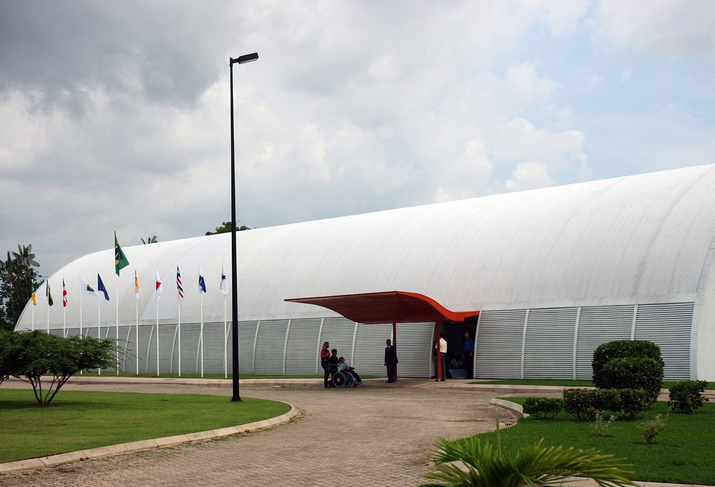 Imagem de Brasília